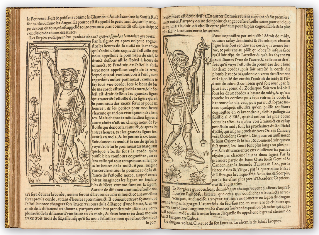 images extraites de "le grand calendrier et compost des bergers compose par le berger de la grande montagne..."